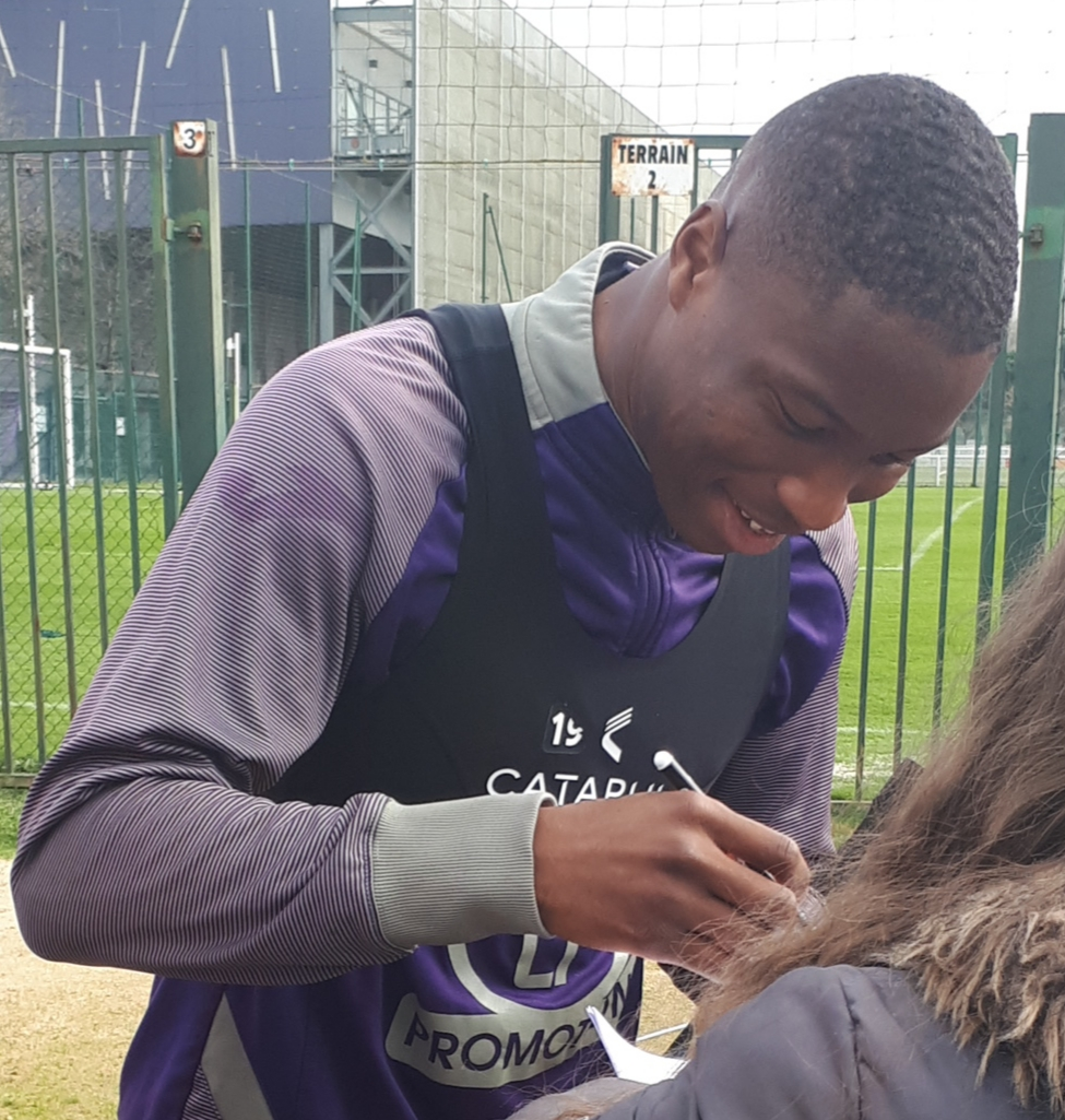 Bafodé Diakité signant des autographes après une séance d'entraînement avec le Toulouse FC le 13 février 2020.